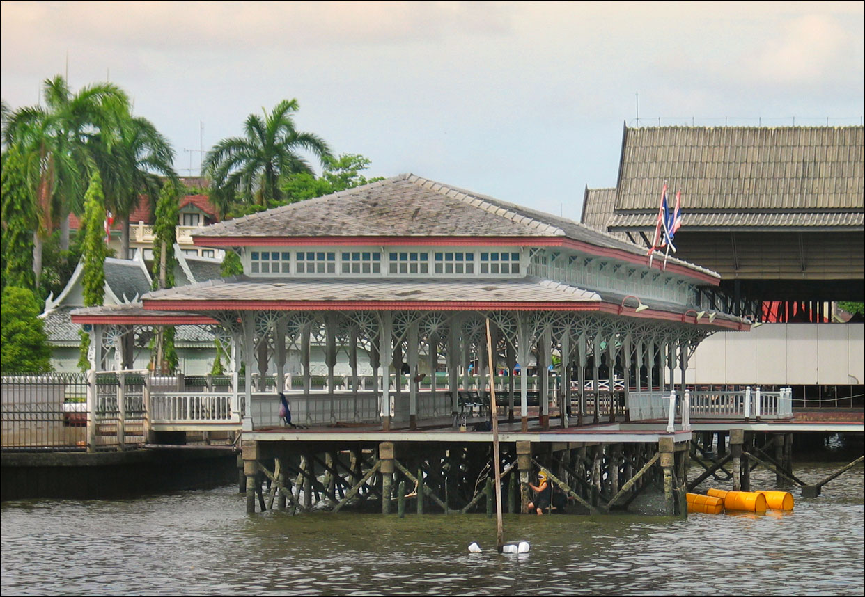 Tha Wasukri (Wasukri Pier), Bangkok, Thailand.